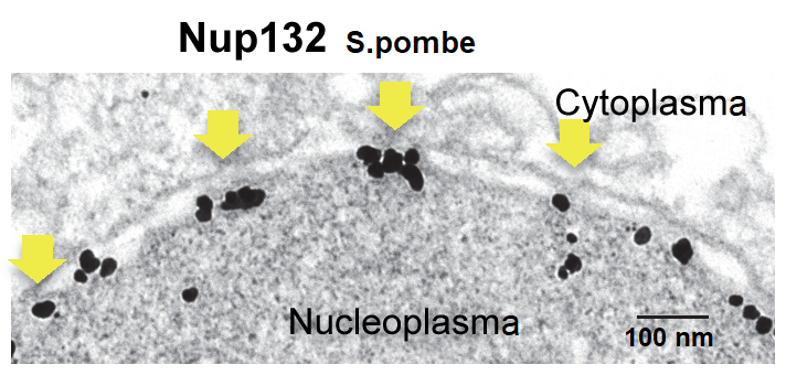 Fig 1.A Localización de spNup131 y spNup132 en el NPC. IEM de la GFP-spNup132. Flechas amarillas indican los poros nucleares. Las Nup132 se encuentran solamente en el lado nucleardel poro nuclear. Barra de escala, 100 nm.